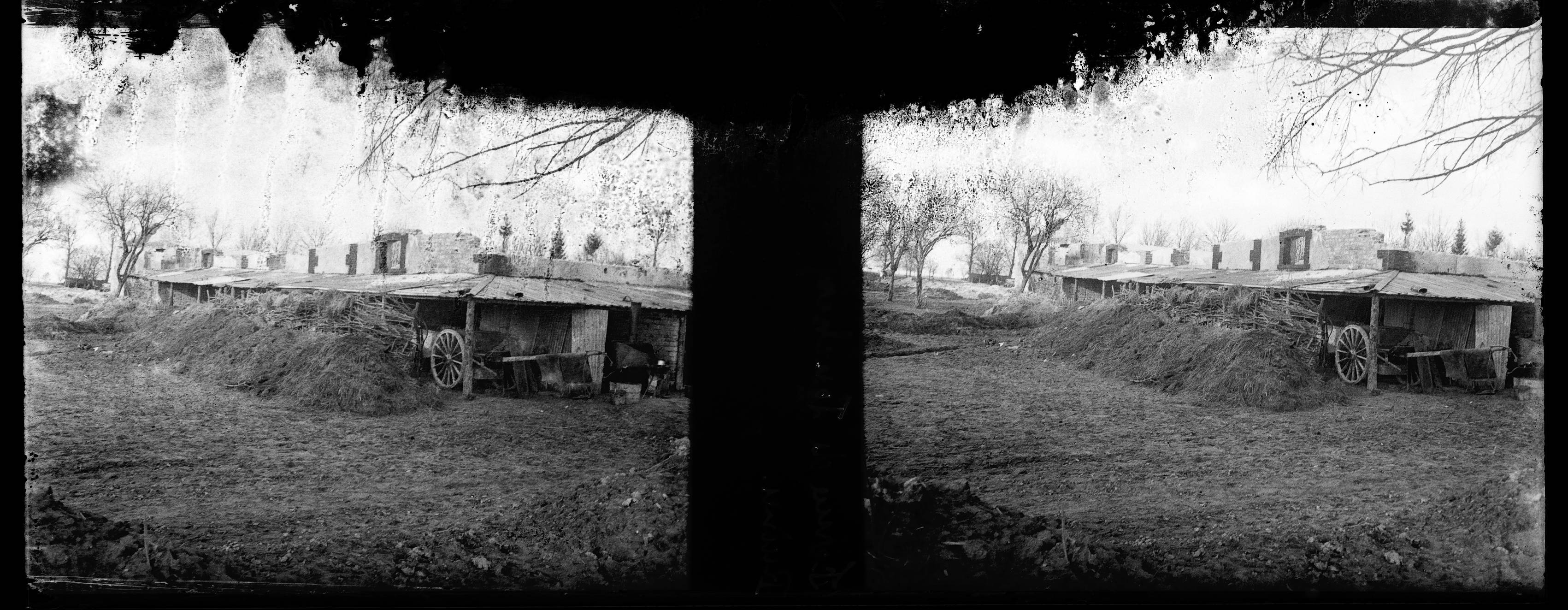 Ruines de la Ferme de Jonchery, près de Jonchery-sur-Suippes (Marne). 191. Guerre 1914-1918.